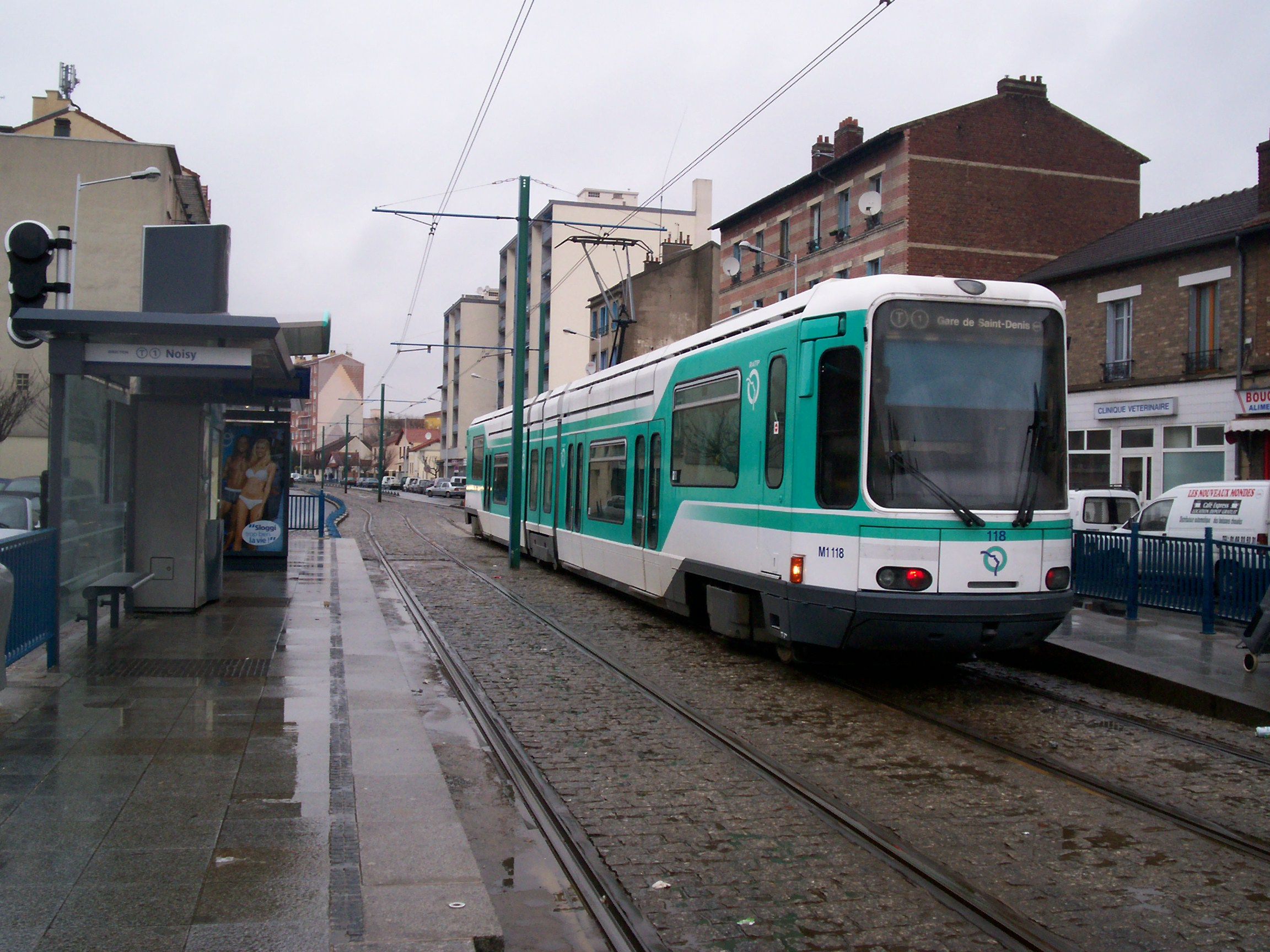 T1 à Danton